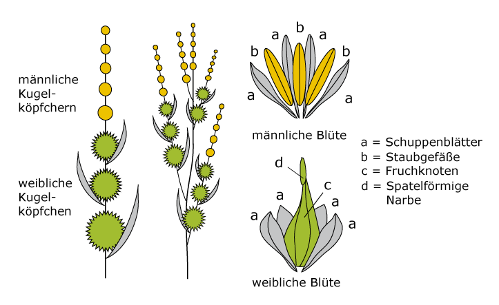 Blüten Sparganium